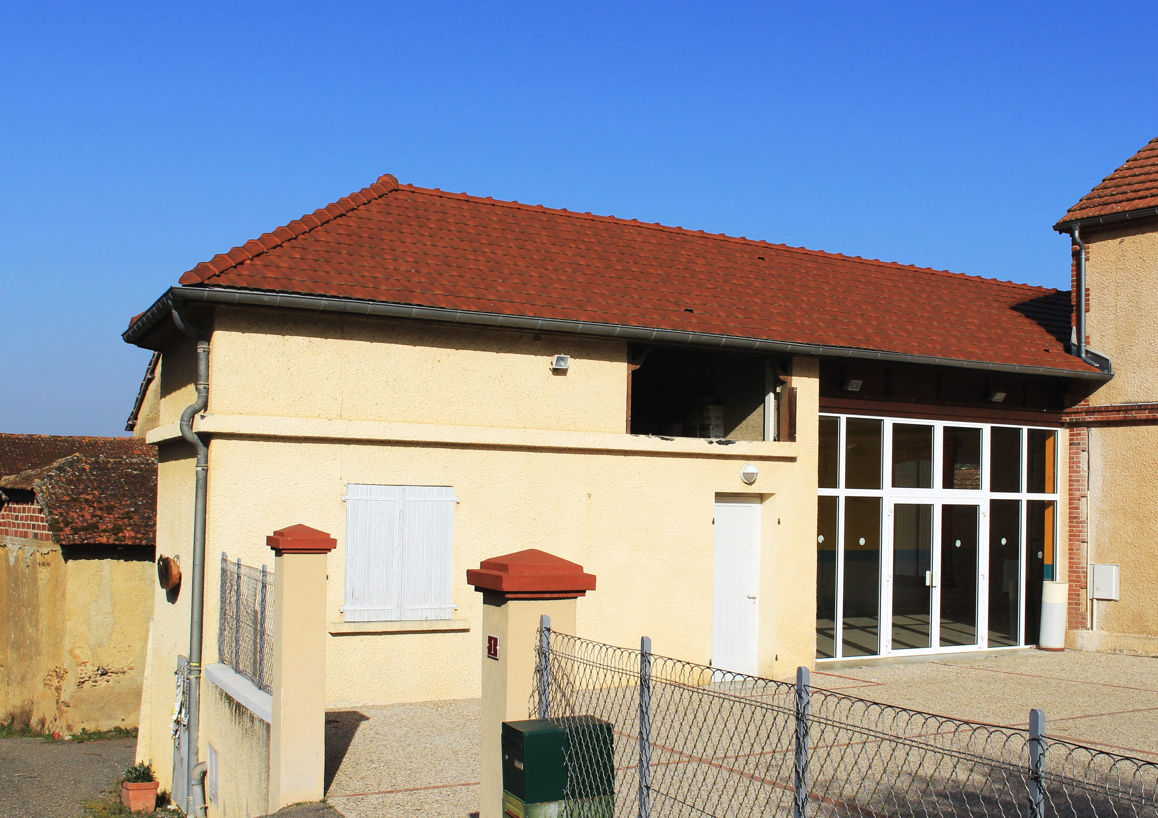 Salle des fêtes de Trouley-Labarthe (Hautes-Pyrénées)